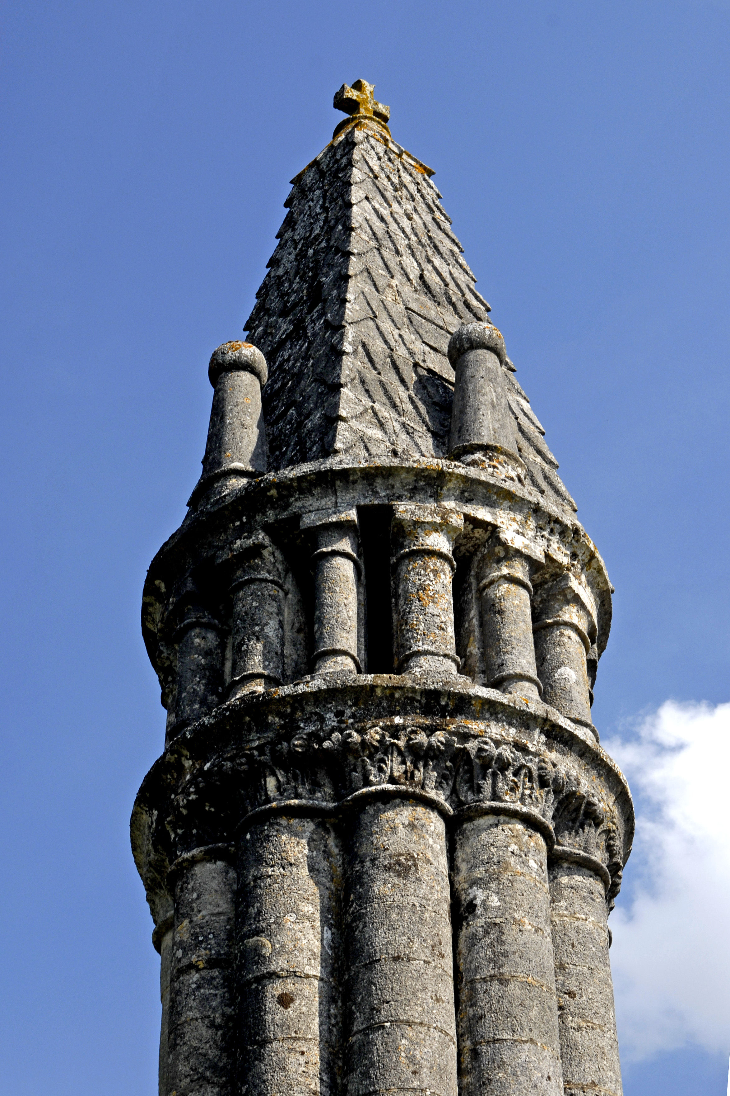 Fenioux, Totenlaterne, Spitze